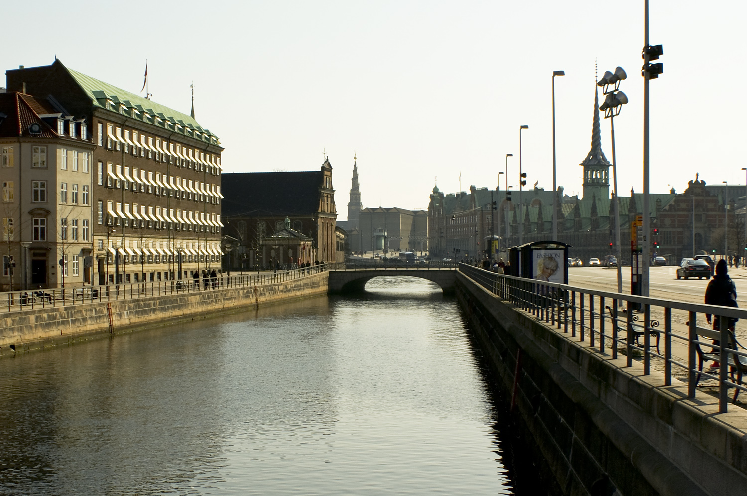 Holmens Bro i København, Danmark